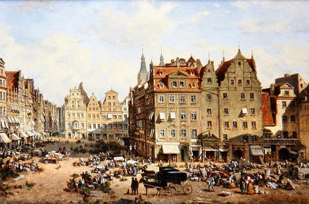 Rynek wrocławski